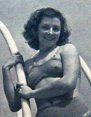 La plongeuse française Mady Moreau, fin mai 1948 (tout juste âgée de vingt ans).